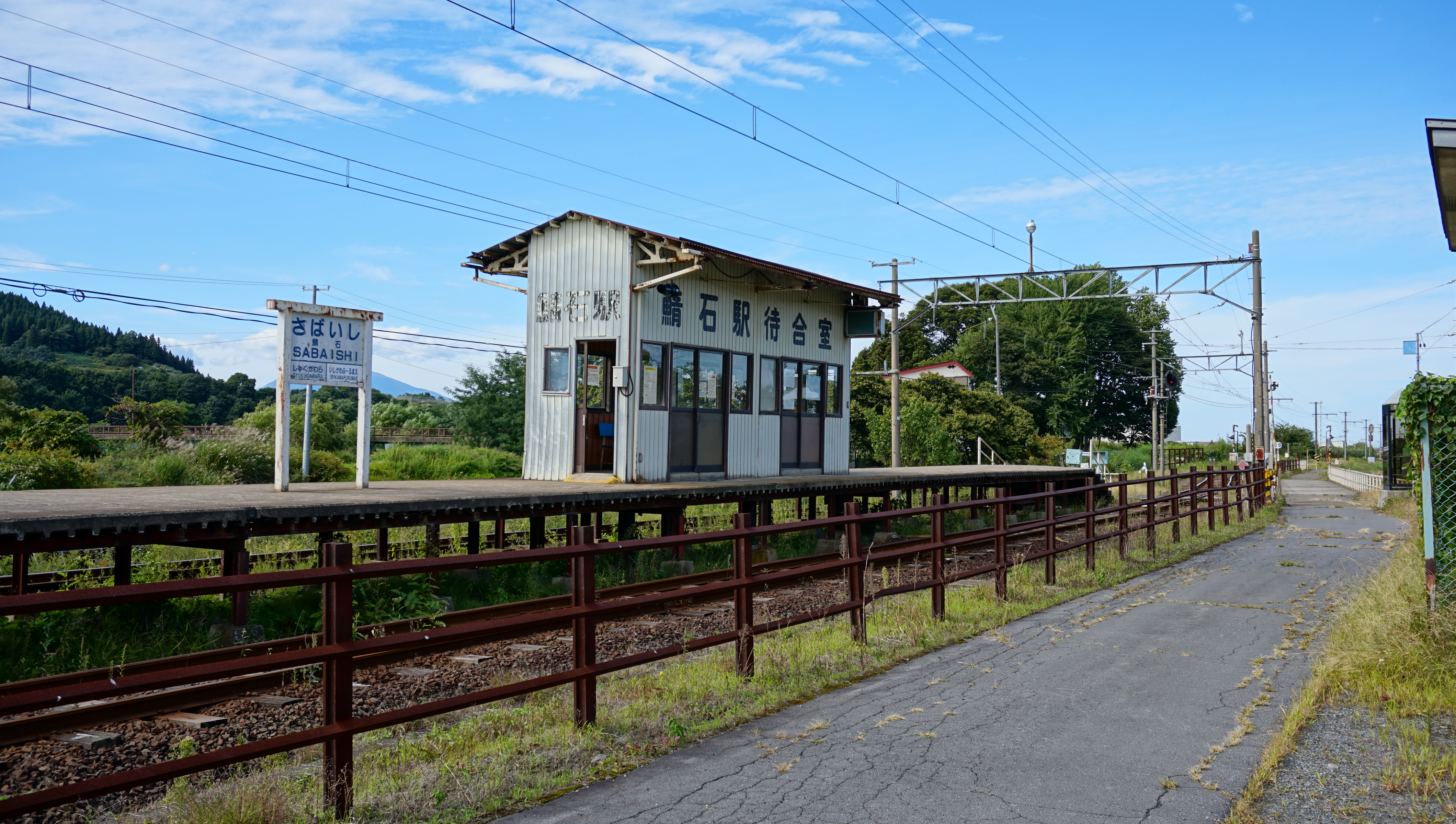 弘南鉄道大鰐線 鯖石駅